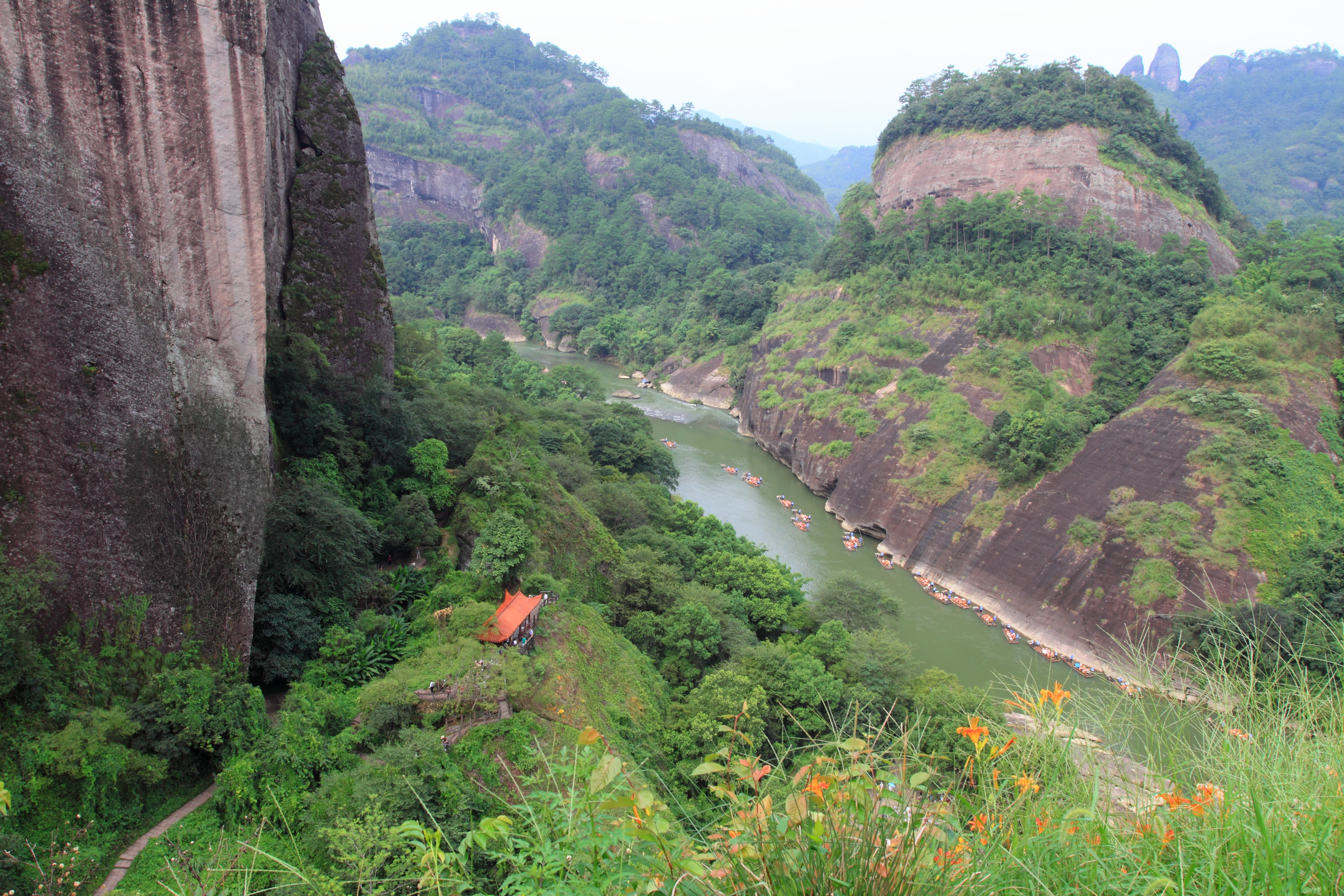 九曲溪——云窝（摄于天游峰登山道）